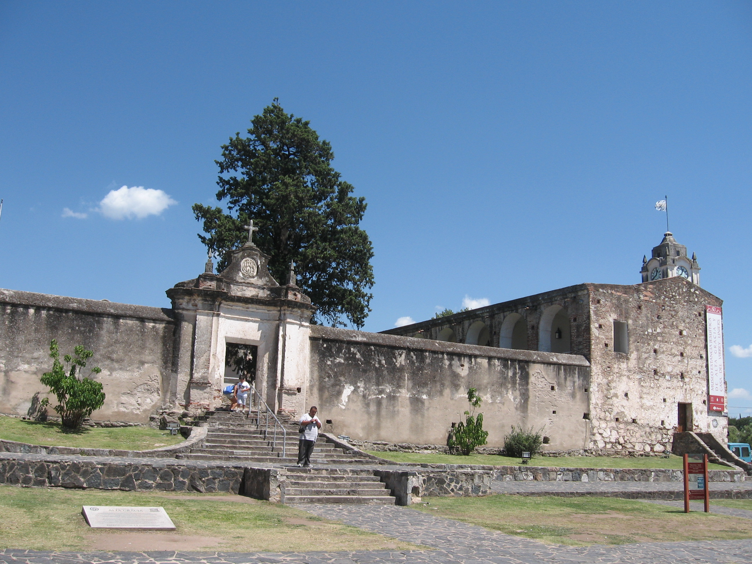 Museo Estancia Jesuítica de Alta Gracia y Casa del Virrey Liniers